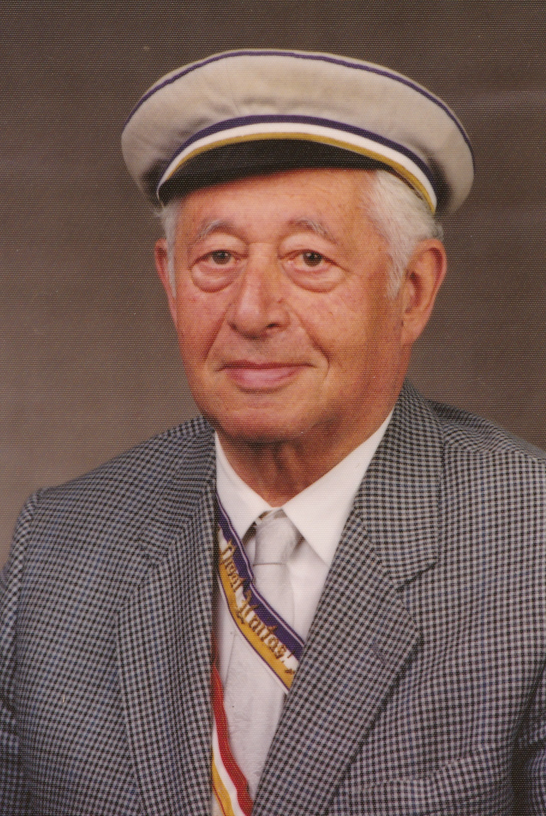 Porträtfotografie von Fritz Roubicek